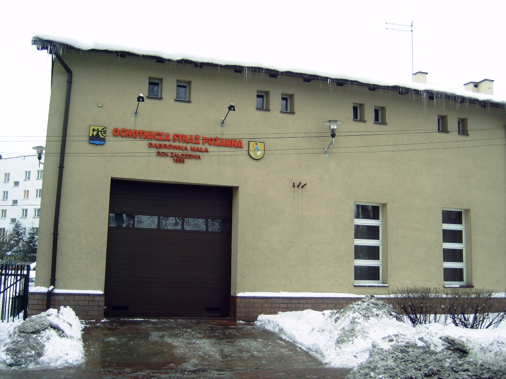 Budynek Ochotniczej Straży Pożarnej w Katowicach-Dąbrówce Małej